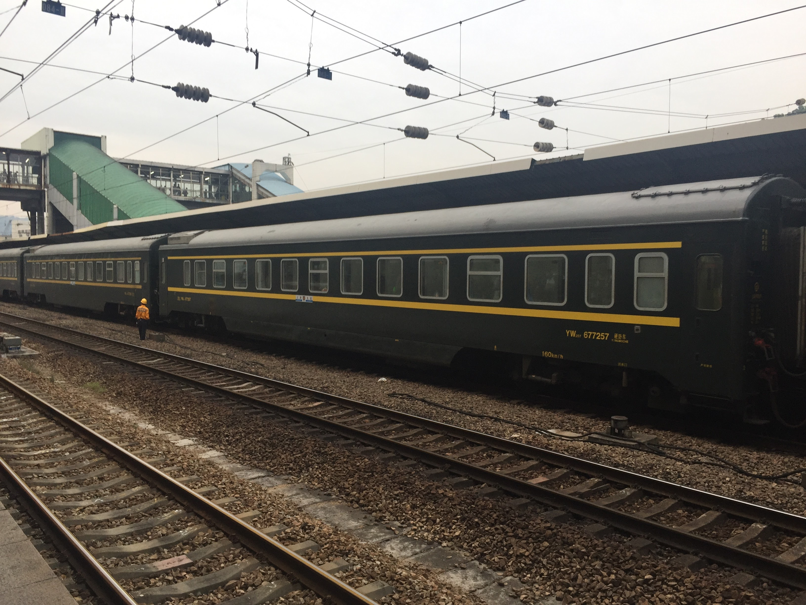 Z100次列車到達廣州東站